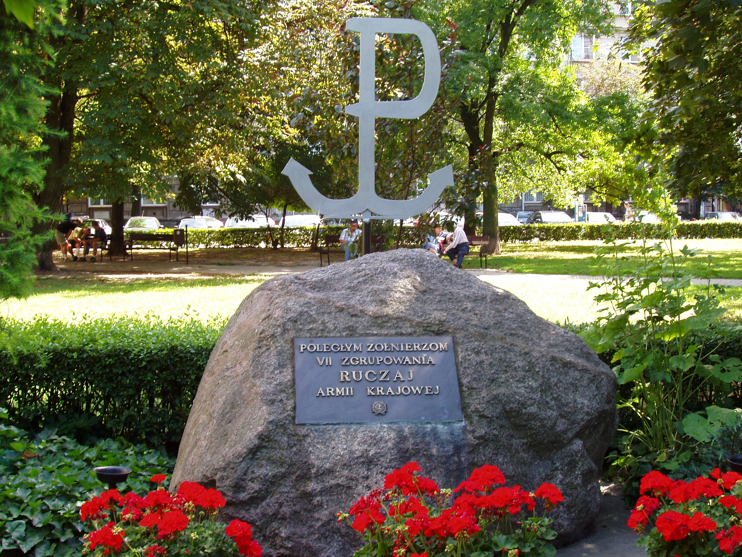 Skwer przy ul. Mokotowskiej w Warszawie (fot Zu)